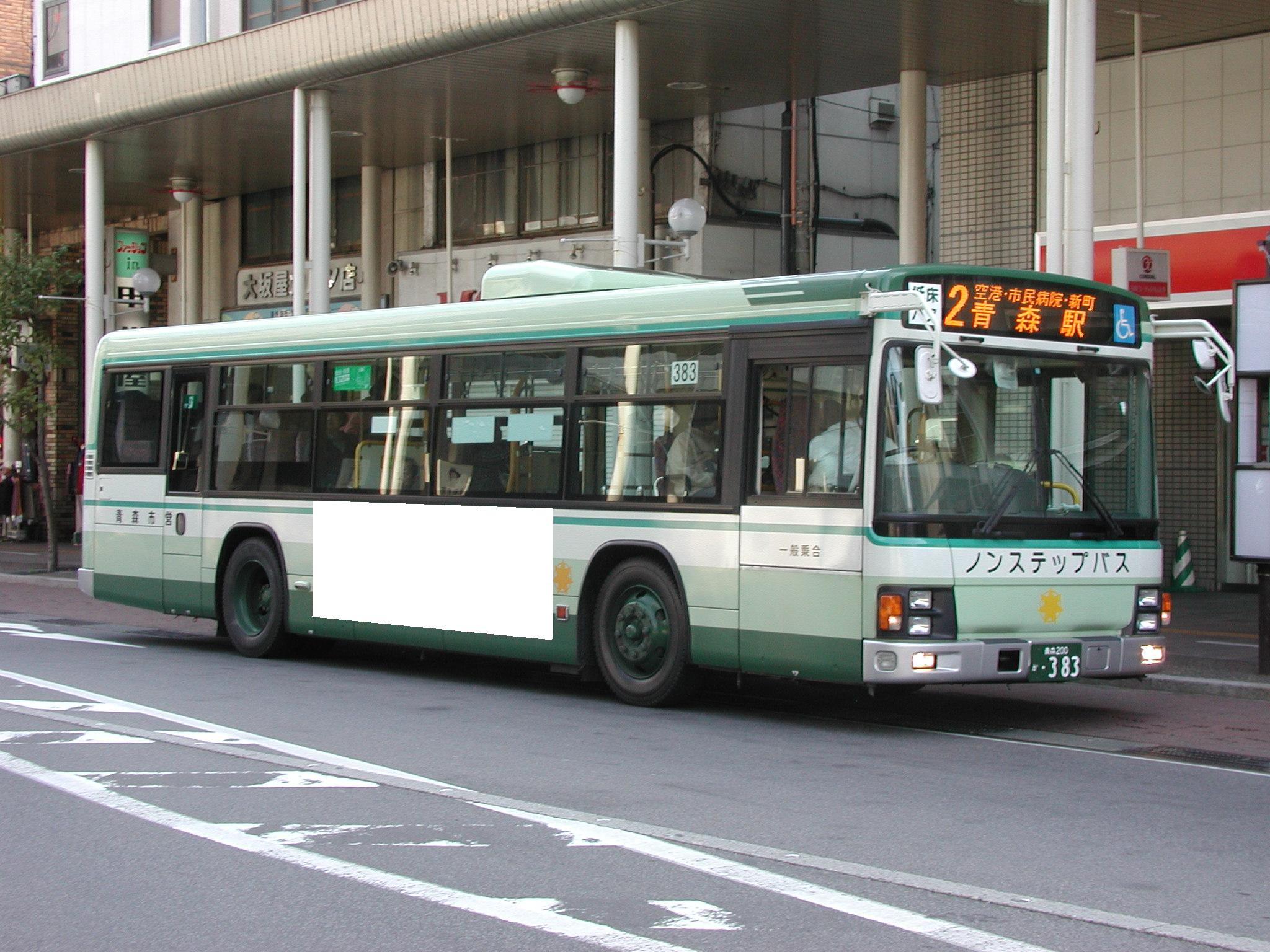 青森市営バス：日野・ブルーリボンIIノンステップ車両（KL-KV280L1）新町一丁目バス停付近にて この車両は浪岡線限定で運用される。 （※：広告部分隠し処理加工済み）